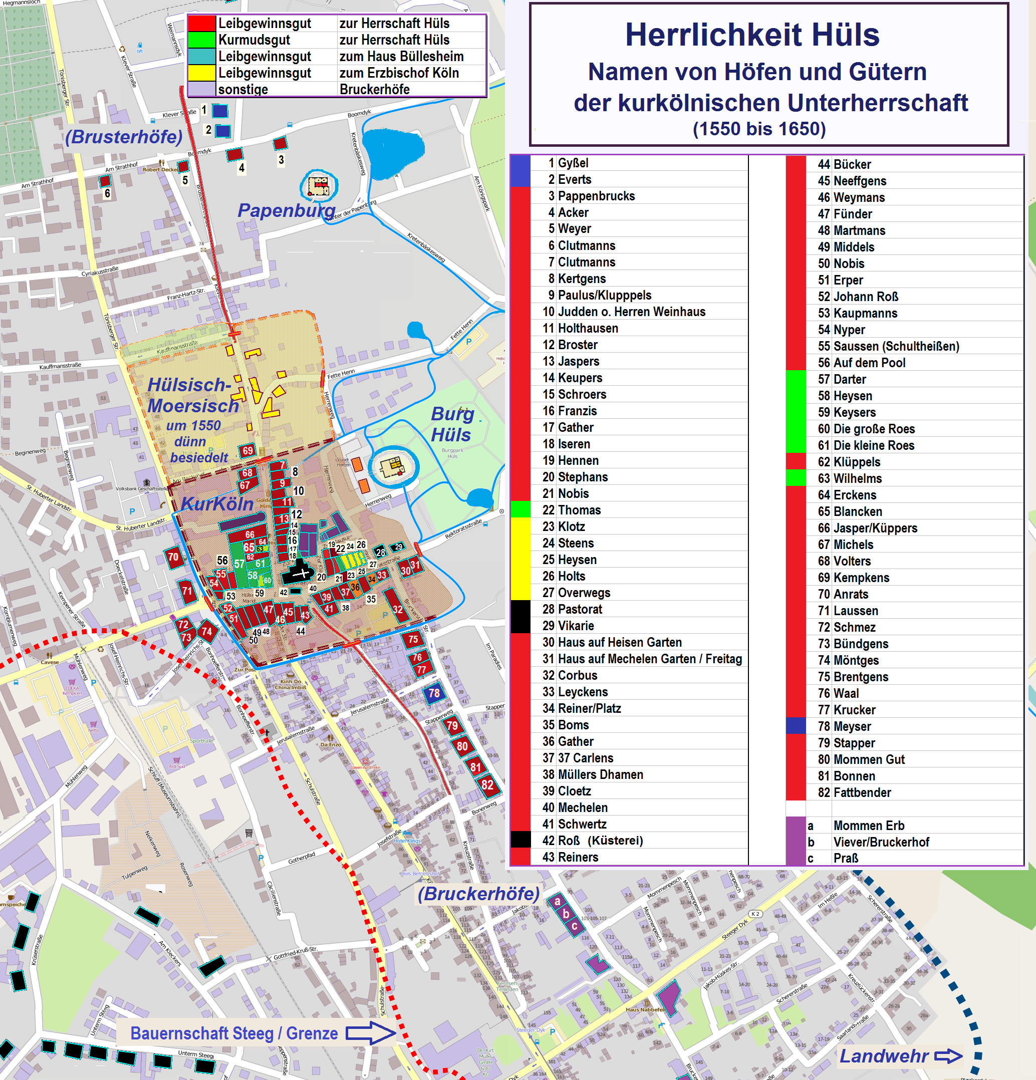 Alte Höfe der Herrlichkeit Hüls (nach 1550) mit Namen der Aufsitzer - Skizze nach Lichtenberg/Kaiser/Mellen This map of Höfe und Güter der Herrlichkeit Hüls (Krefeld) im 16./17. Jahrhundert was created from OpenStreetMap project data, collected by the community. This map may be incomplete, and may contain errors. Don't rely solely on it for navigation.